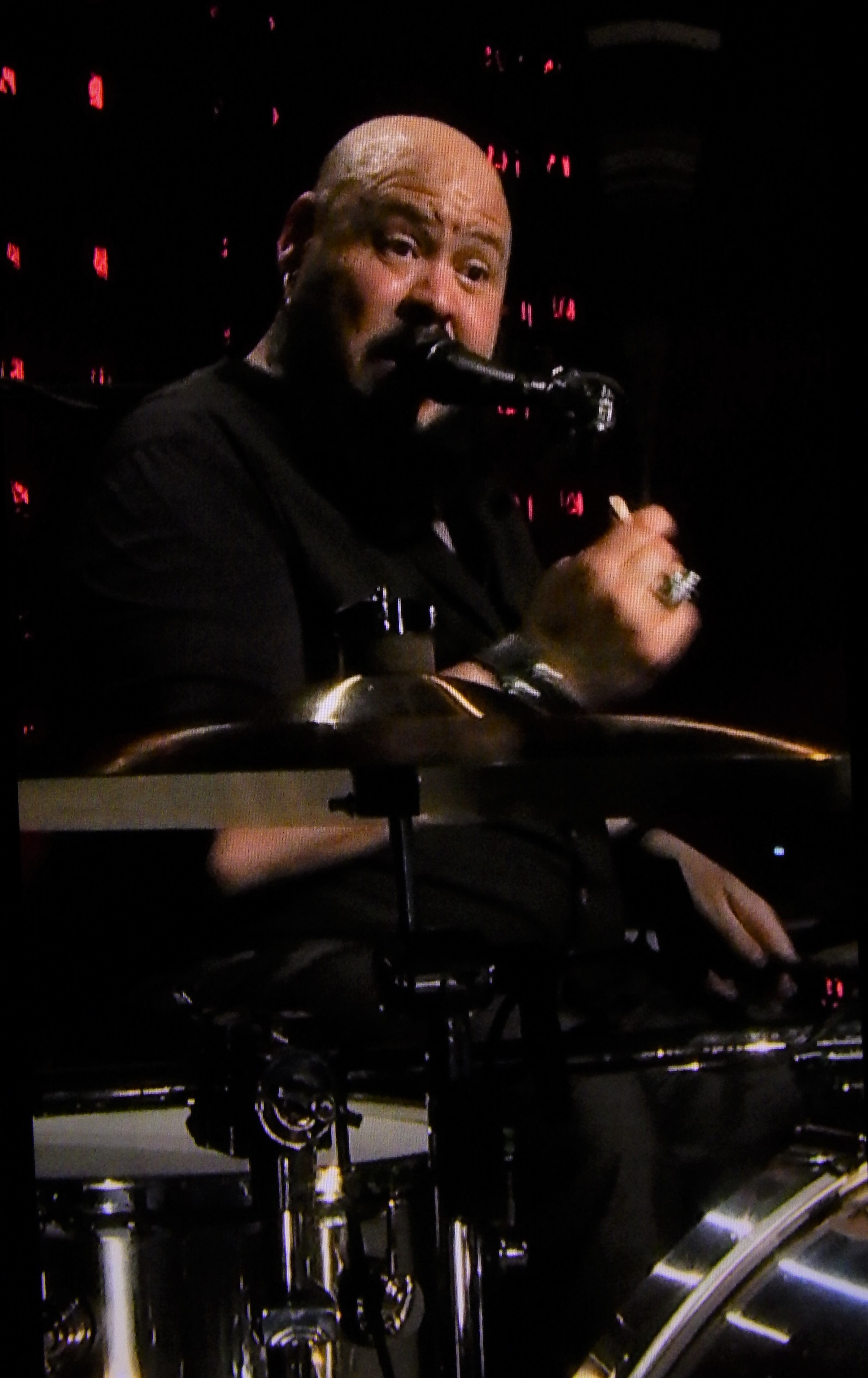 Show de Paul McCartney da turnê Freshen Up, no Allianz Parque, São Paulo Brasil, em 26 de março de 2019.